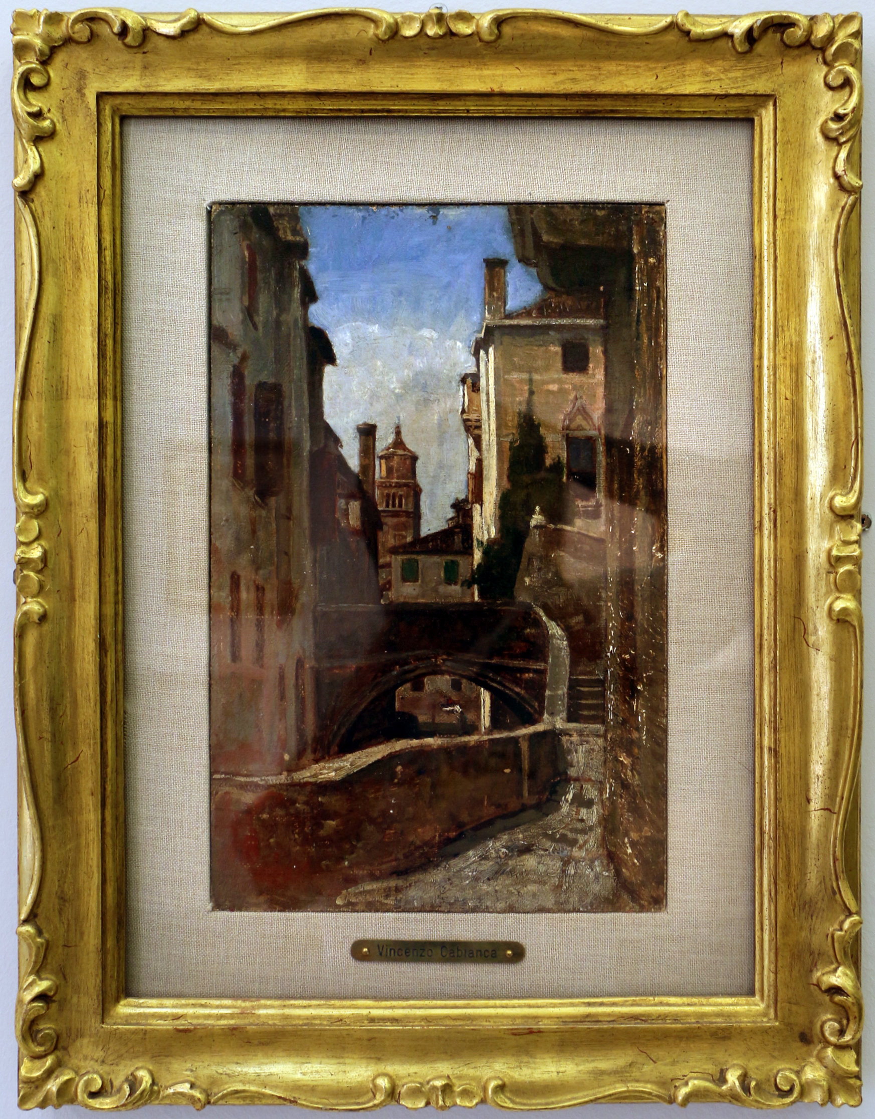 Palazzo della città metropolitana di Bari This is a photo of a monument which is part of cultural heritage of Italy.